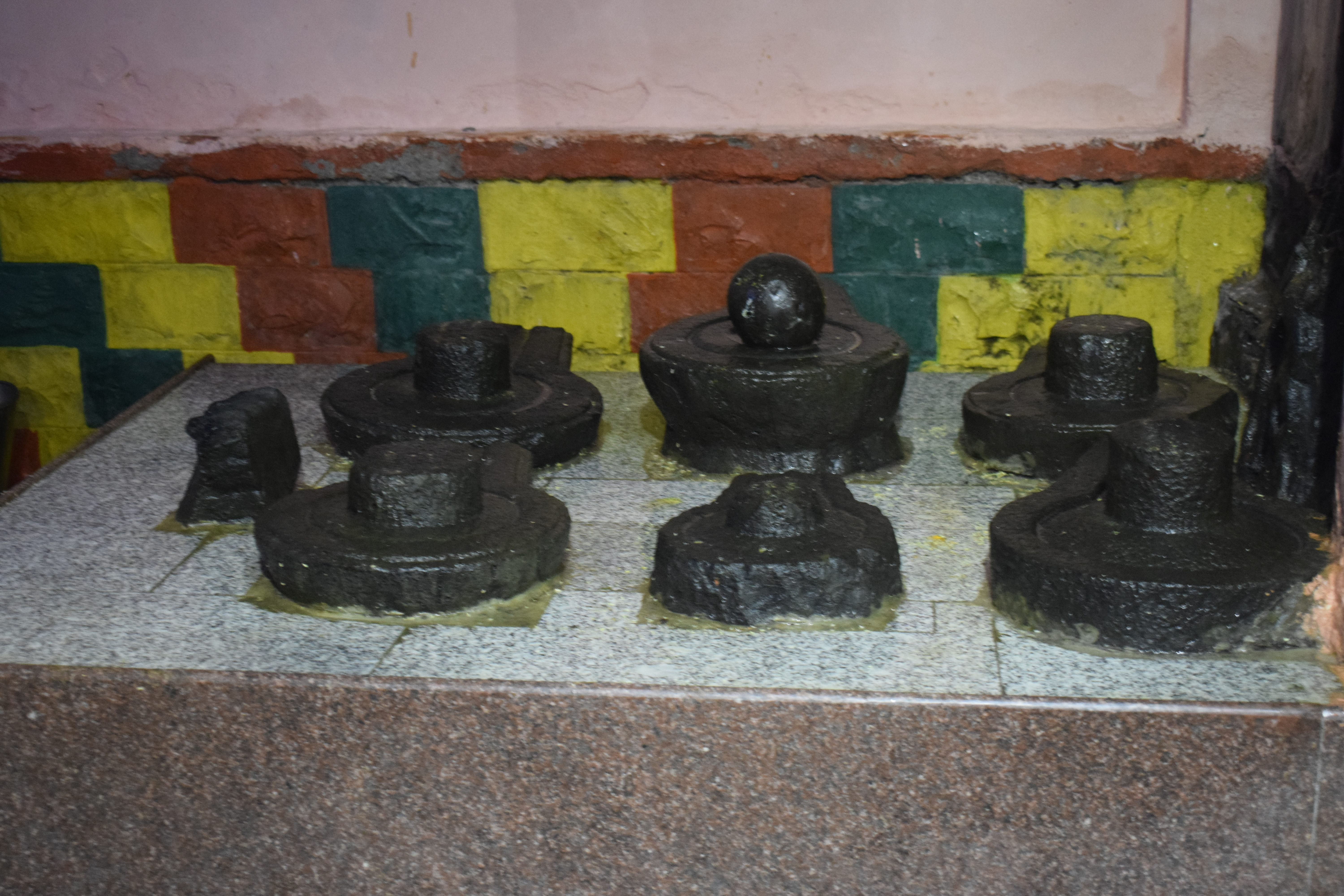 श्री अडकेश्वर लिंग